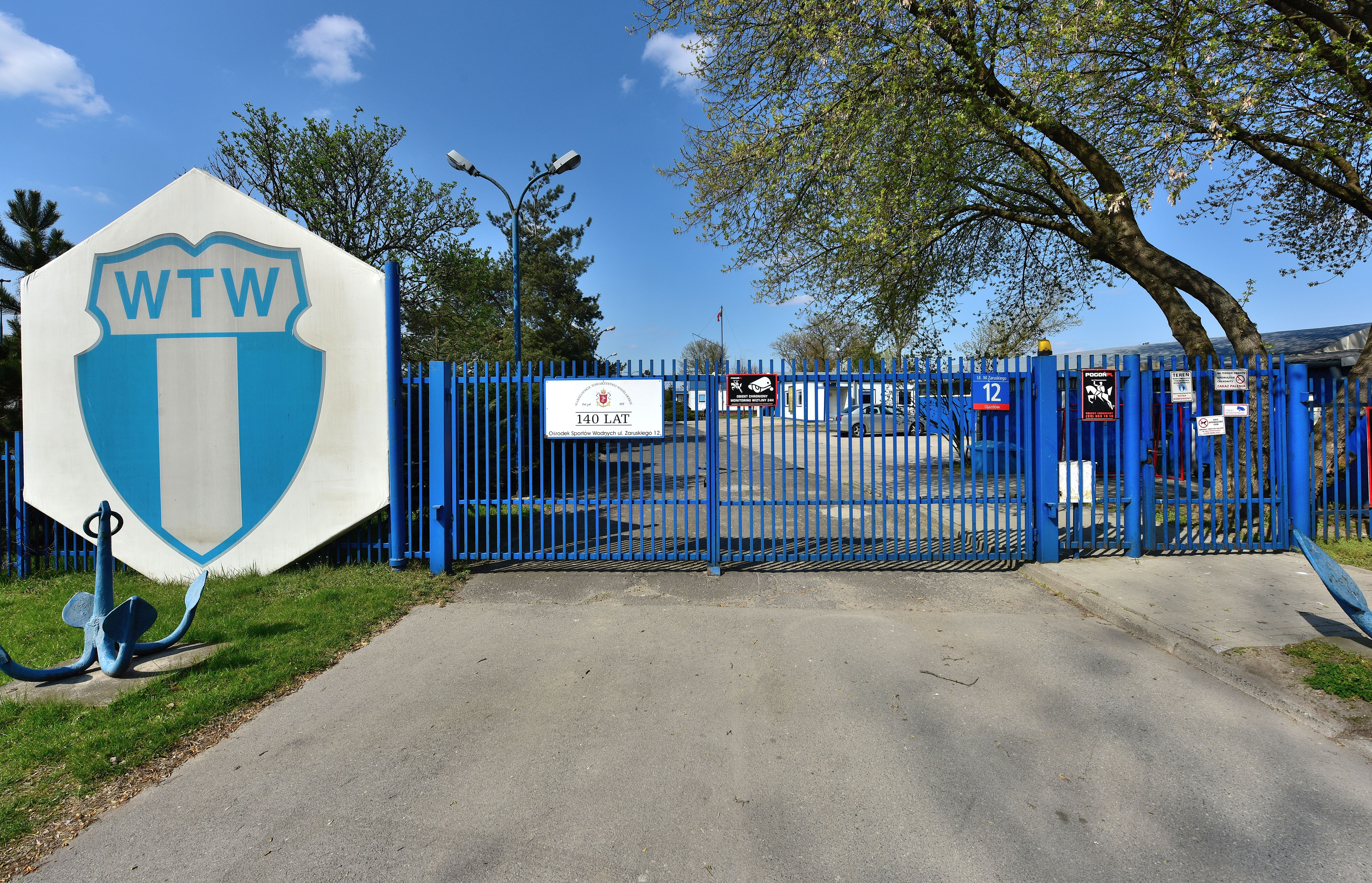 Siedziba Warszawskiego Towarzystwa Wioślarskiego przy ul. Zaruskiego 12 w Warszawie